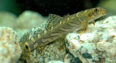 Acanthocobitis botia